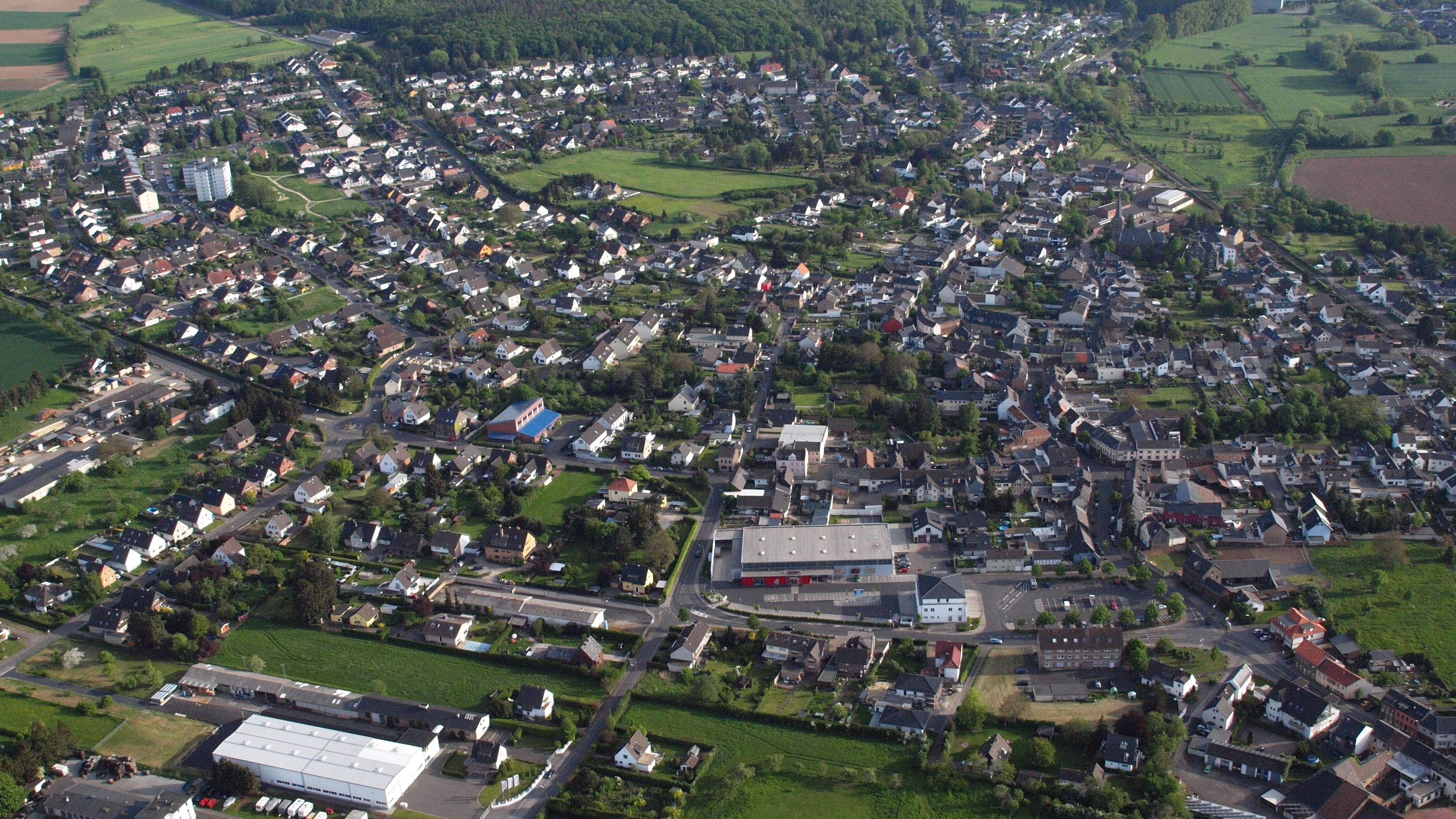 Stotzheim (Euskirchen), Luftaufnahme (2015)